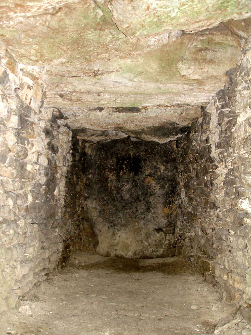 Allée couverte des Déserts, à Argenteuil (Val-d'Oise)